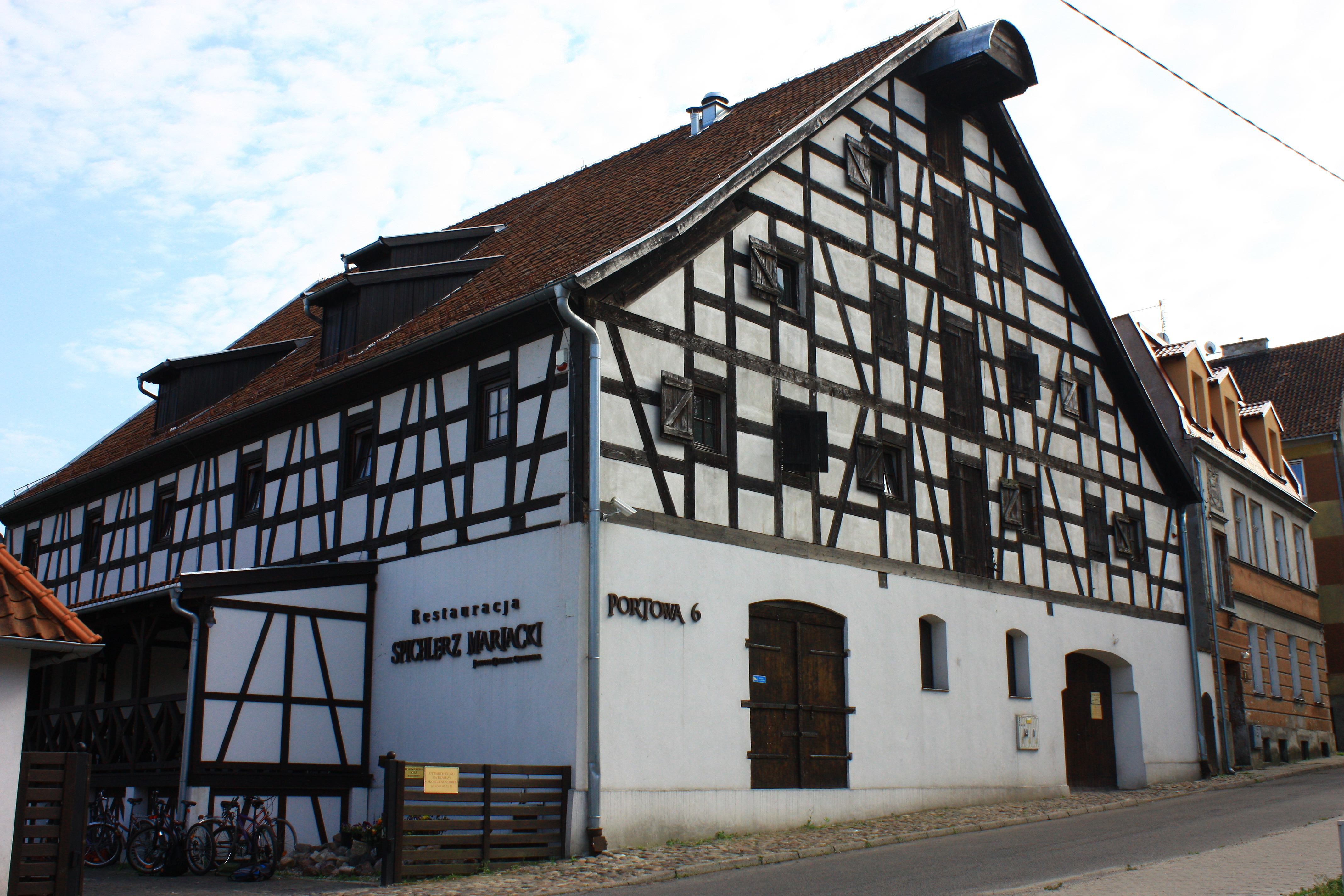 Braniewo, spichrz "Mariacki", XVII, XVIII, XIX